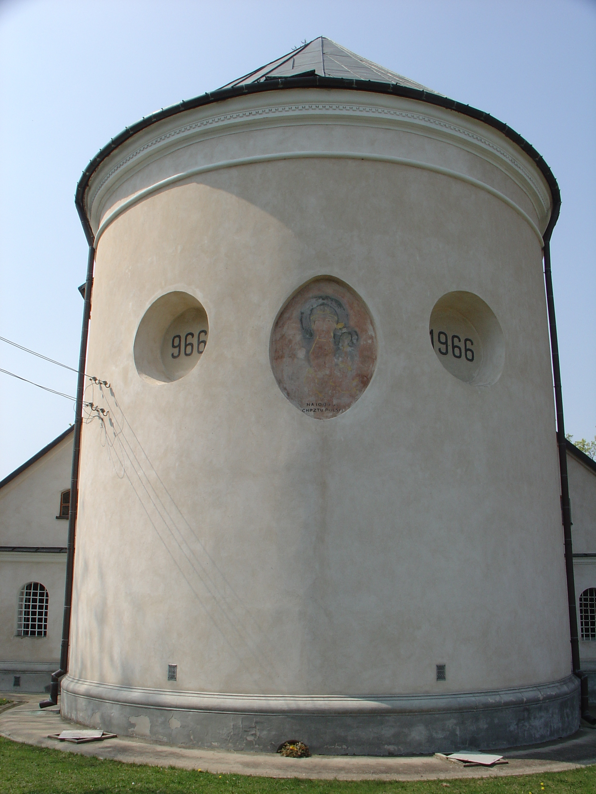 Prezbiterium kościoła w Knychówku